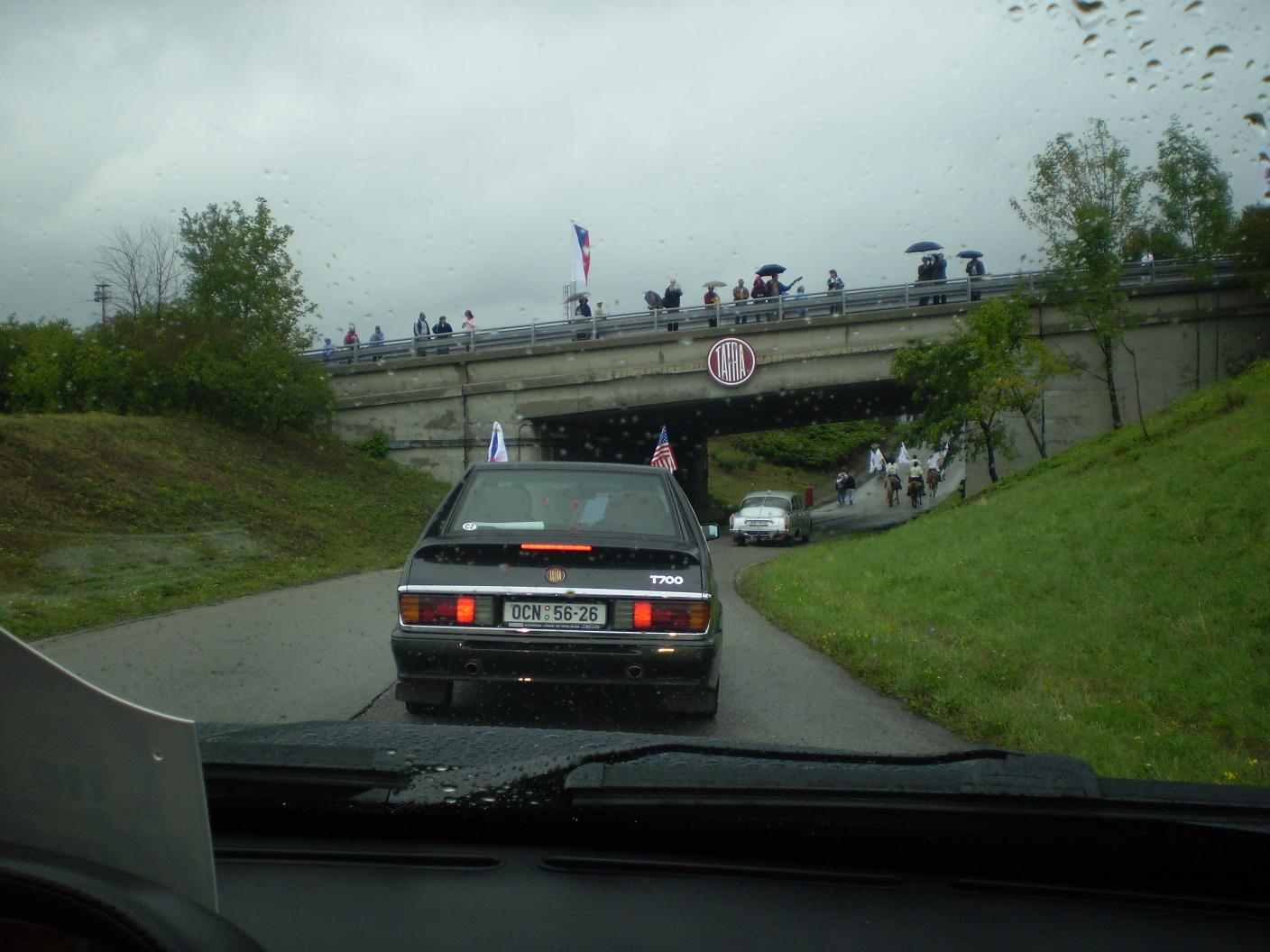 První modelová řada s ploutvemi